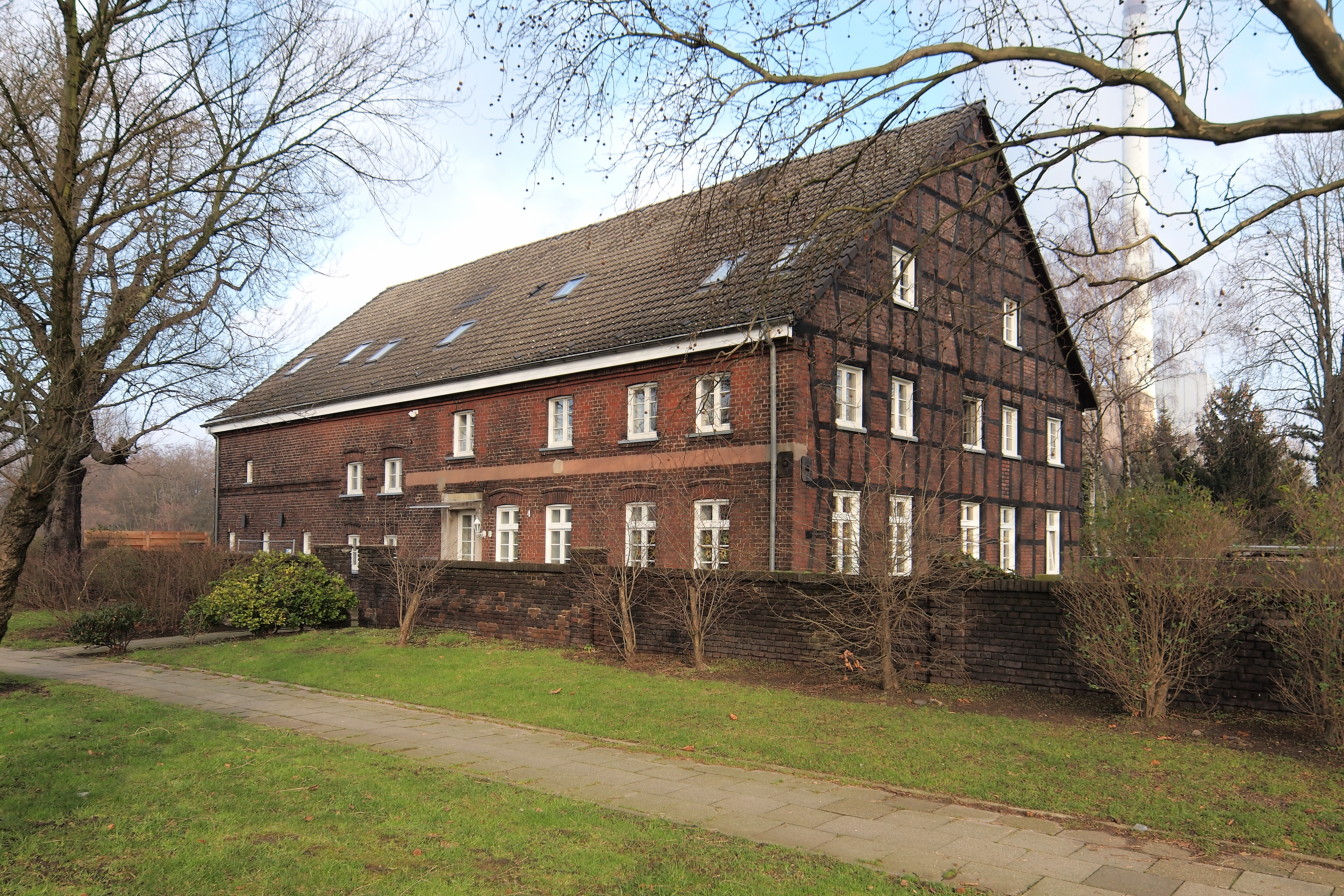 Bauernhof in Herne-Baukau, Hertener Str. 4